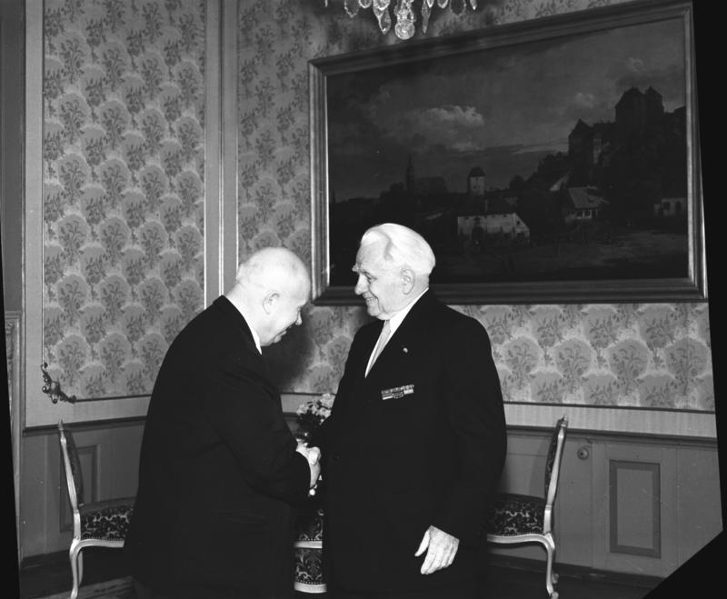 Zentralbild/Heilig 9.3.1959 N.S. Chruschtschow besuchte Wilhelm Pieck N.S. Chruschtschow stattete am 9.3.1959 vormittags dem Präsidenten der DDR Wilhelm Pieck in dessen Amtssitz Schloß Niederschönhausen einen Besuch ab. UBz: N.S. Chruschtschow begrüßt Präsident Wilhelm Pieck.